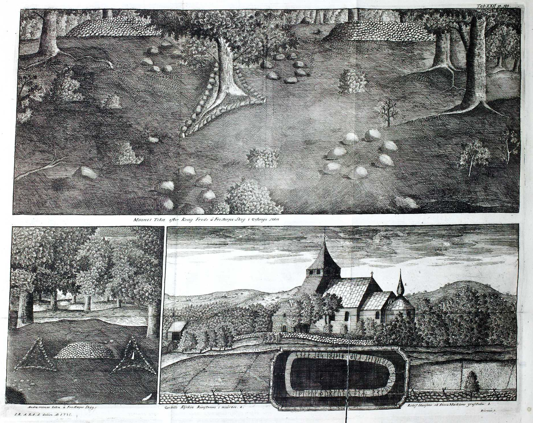 Kvibille kyrka 1735 Ur: Hallandia antiqua et hodierna 1753